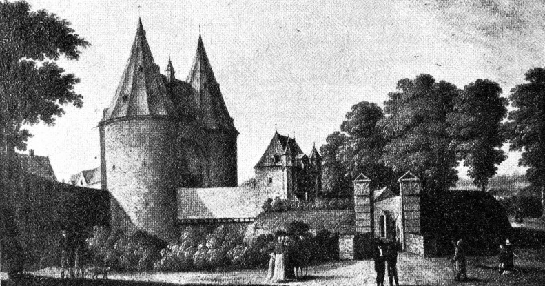 Das Kölntor ist ein ehemaliges Stadttor des äußeren Ringes der Stadt Aachen